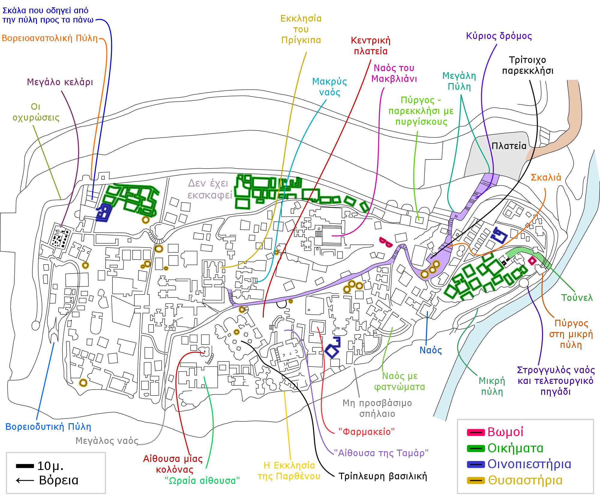 Μετάφραση του File:Uplistsikhe en.svg